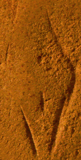 Venus von Bierden in der Sonderausstellung Im Goldenen Schnitt – Niedersachsens längste Ausgrabung, die zwischen August 2013 und März 2014 im Niedersächsischen Landesmuseum gezeigt wurde.